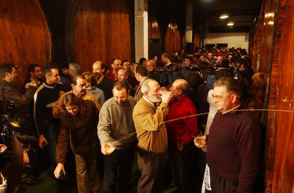 Sagardotegian txotxetik edaten.